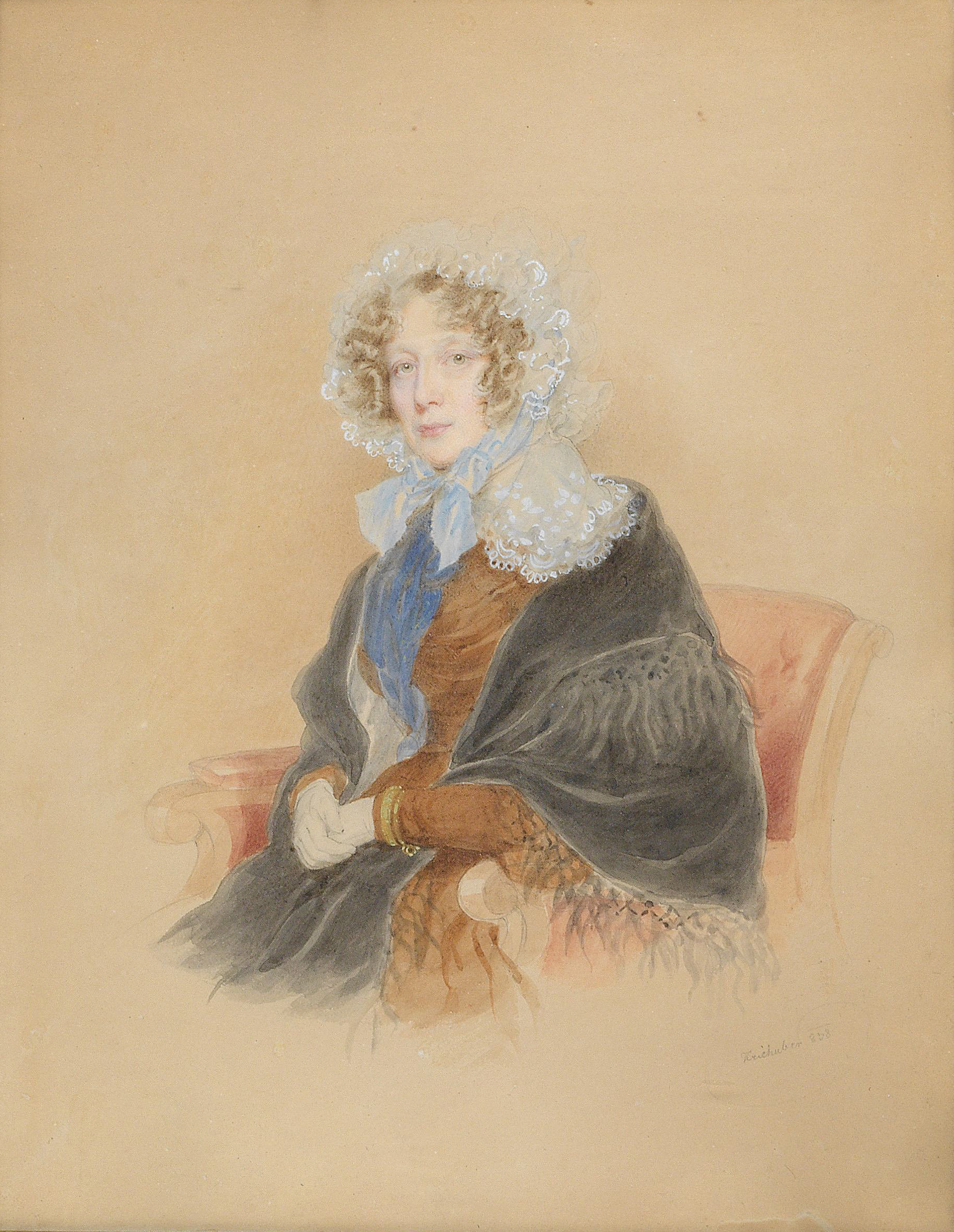 Porträt der Fürstin Franziska Kaunitz-Rietberg, geb. Gräfin Ungnad von Weissenwolf, Ehefrau des Aloys Fürst Kaunitz-Rietberg. Aquarell auf Papier, signiert und datiert "Kriehuber (1)832, 25 x 19,5 cm, Rückseitiges altes Klebeetikett zur Provenienz mit handschriftlicher Bezeichnung: Porträt der Fürstin Fanny Kaunitz geb. Grafin Weissenwolff. Dieses Bild vermachte meine Großtante Tini Palffy (Tochter der Fürstin Kaunitz) meiner Schwester, diese meinem Bruder u. ich erlaubte es mir meiner lieben Cousine Nadine Berchtold, Urenkelin der Fürstin Kaunitz zu verehren. Nikolaus Palffy Wien 24.1.1929.